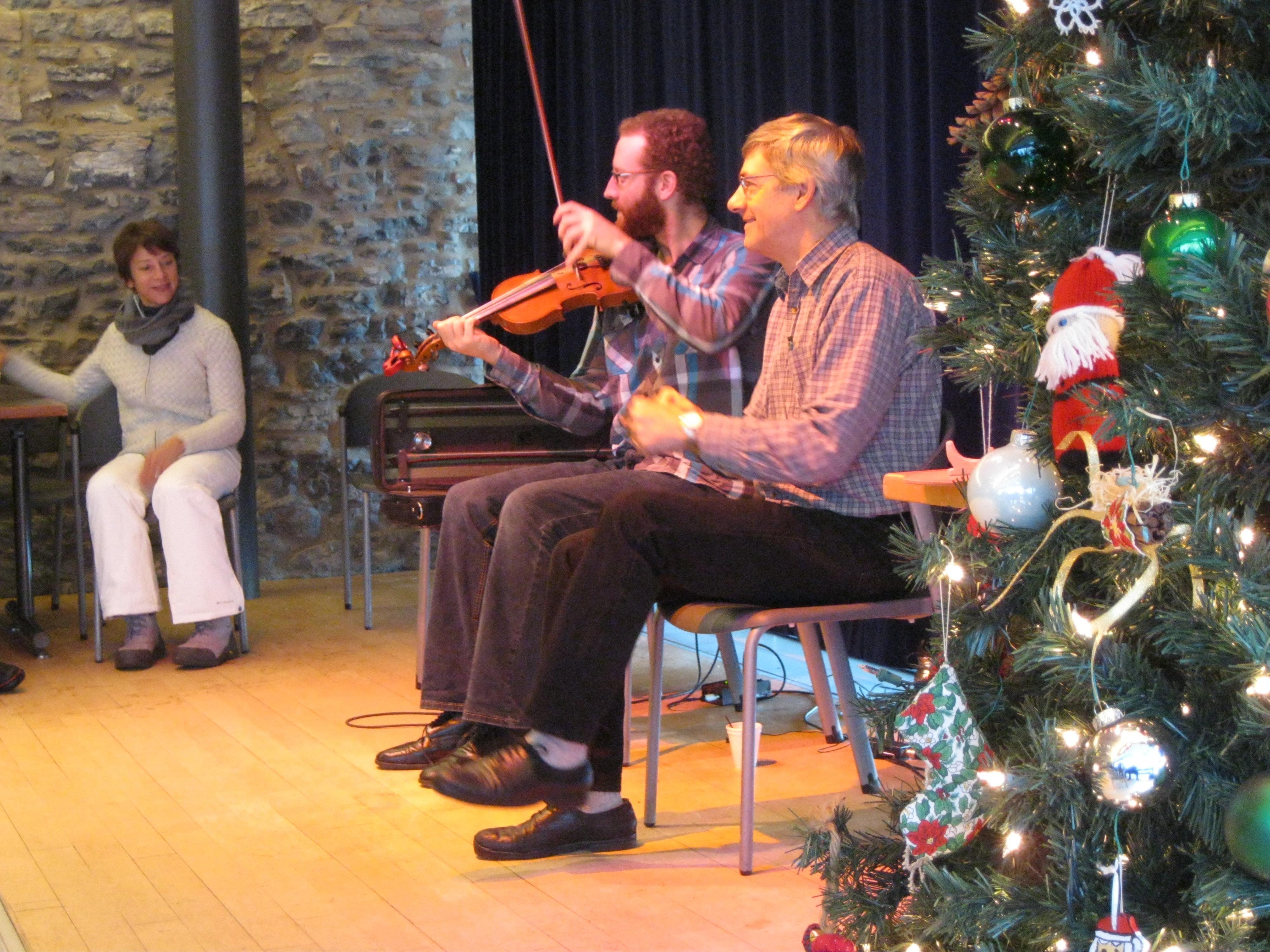 Animation au musée de la place Royale, Québec